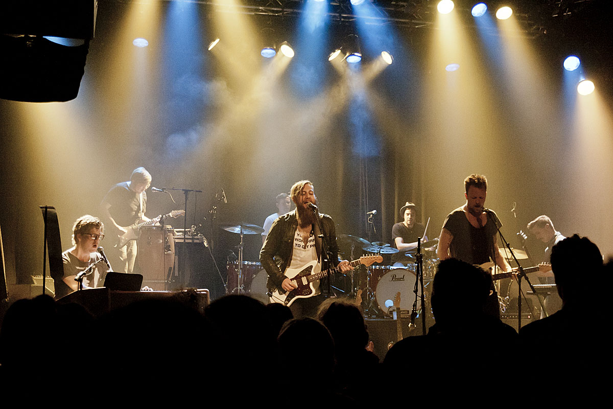 The Eclectic Moniker ved en koncert på Forbrændingen 17. november 2012